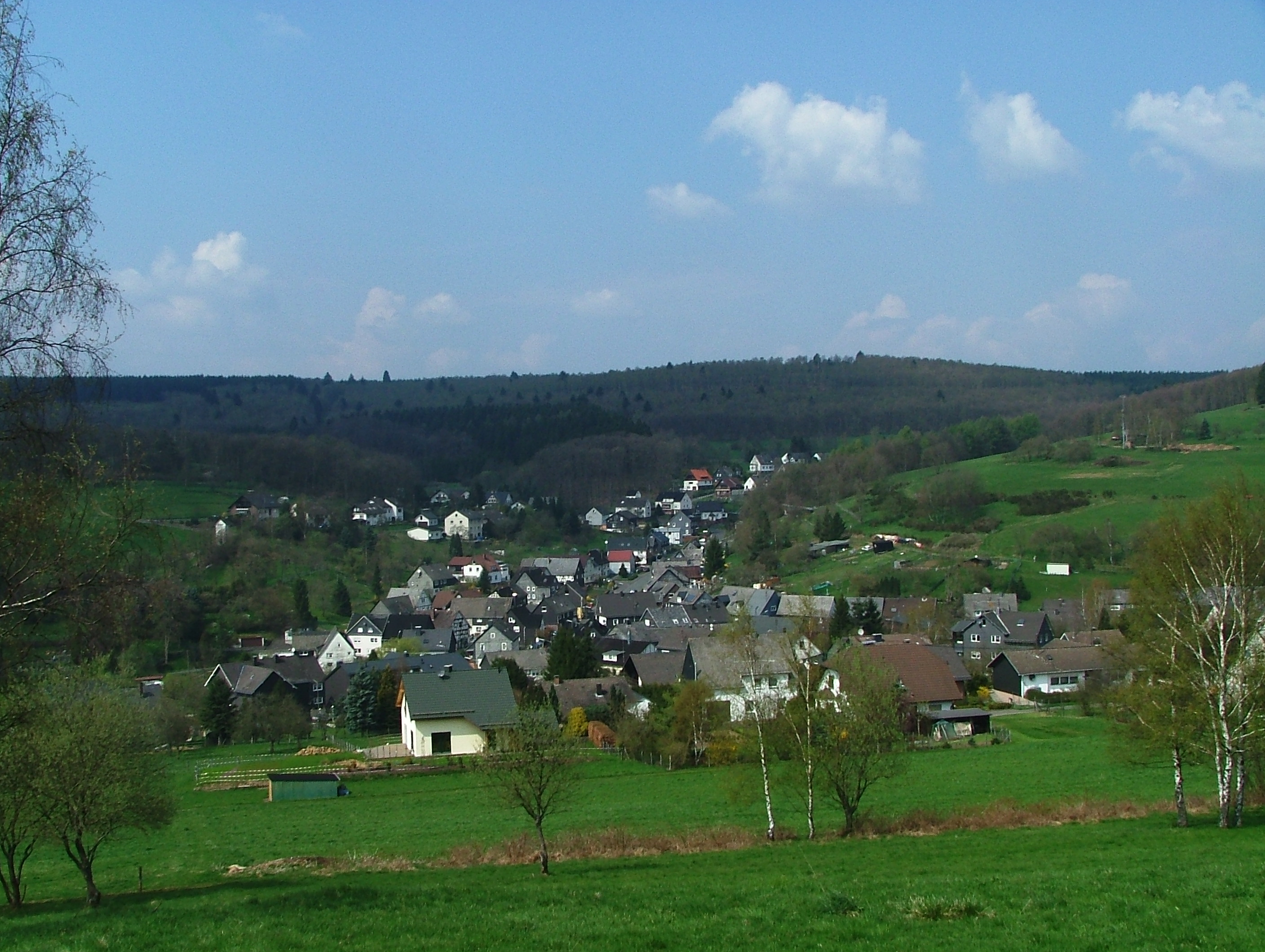 Burbach, Ortsteil Gilsbach